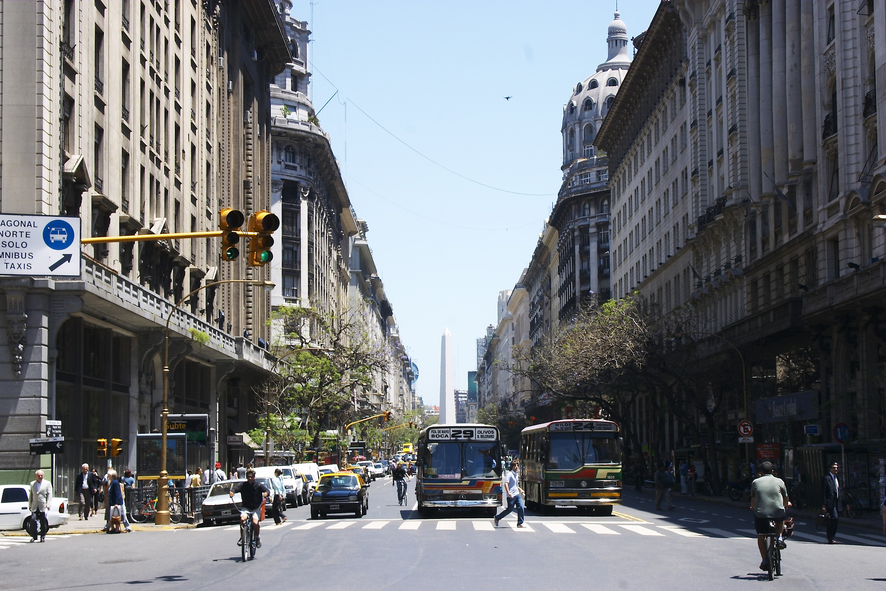 Vista de la Av. Roque Saenz Peña (Diagonal Norte) desde la Plaza de Mayo al mediodía, Buenos Aires, Argentina. Al fondo se observa el obelisco.